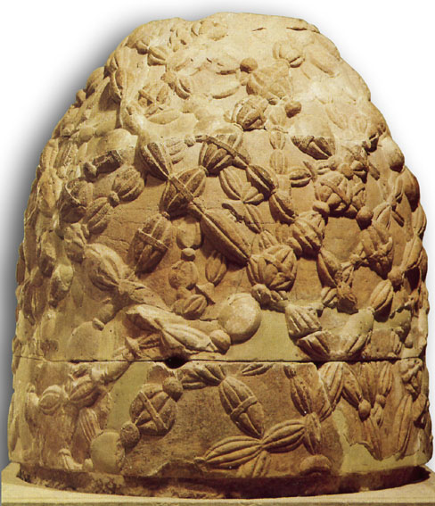 Ónfalos de Delfos Fotografía realizada por Lourdes Cardenal en abril de 1980 en el museo de Delfos